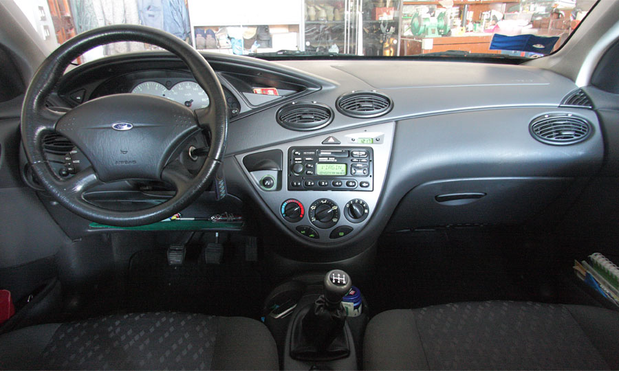 Cruscotto di una Ford Focus prima serie allestimento Zetec (anno 2000)